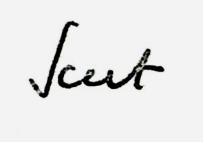 Signature familière de Louis Scutenaire, scan d'après lettre adressée à l'User. Cette image ou le texte qui y est représenté est seulement composé de formes géométriques simples et de texte. Elle n’atteint pas le seuil d'originalité nécessaire pour la protection du droit d’auteur, et est donc du domaine public.